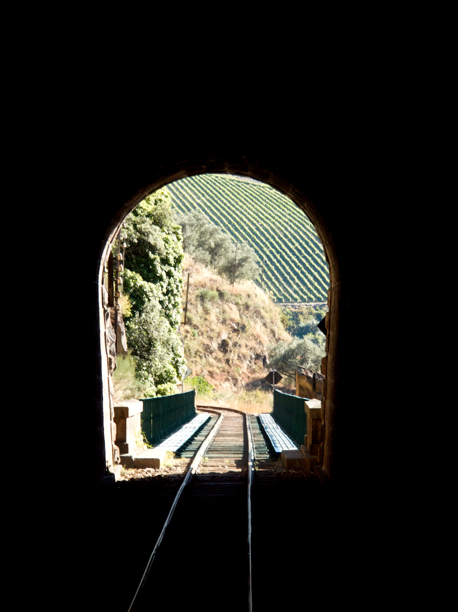 a bordo do Regional 6202. Via férrea: Linha do Tua [PK 1] Local: Túnel das Presas (e Viaduto homónimo) Data e hora: 17 de Junho de 2008 [17h56] Sentido: Tua